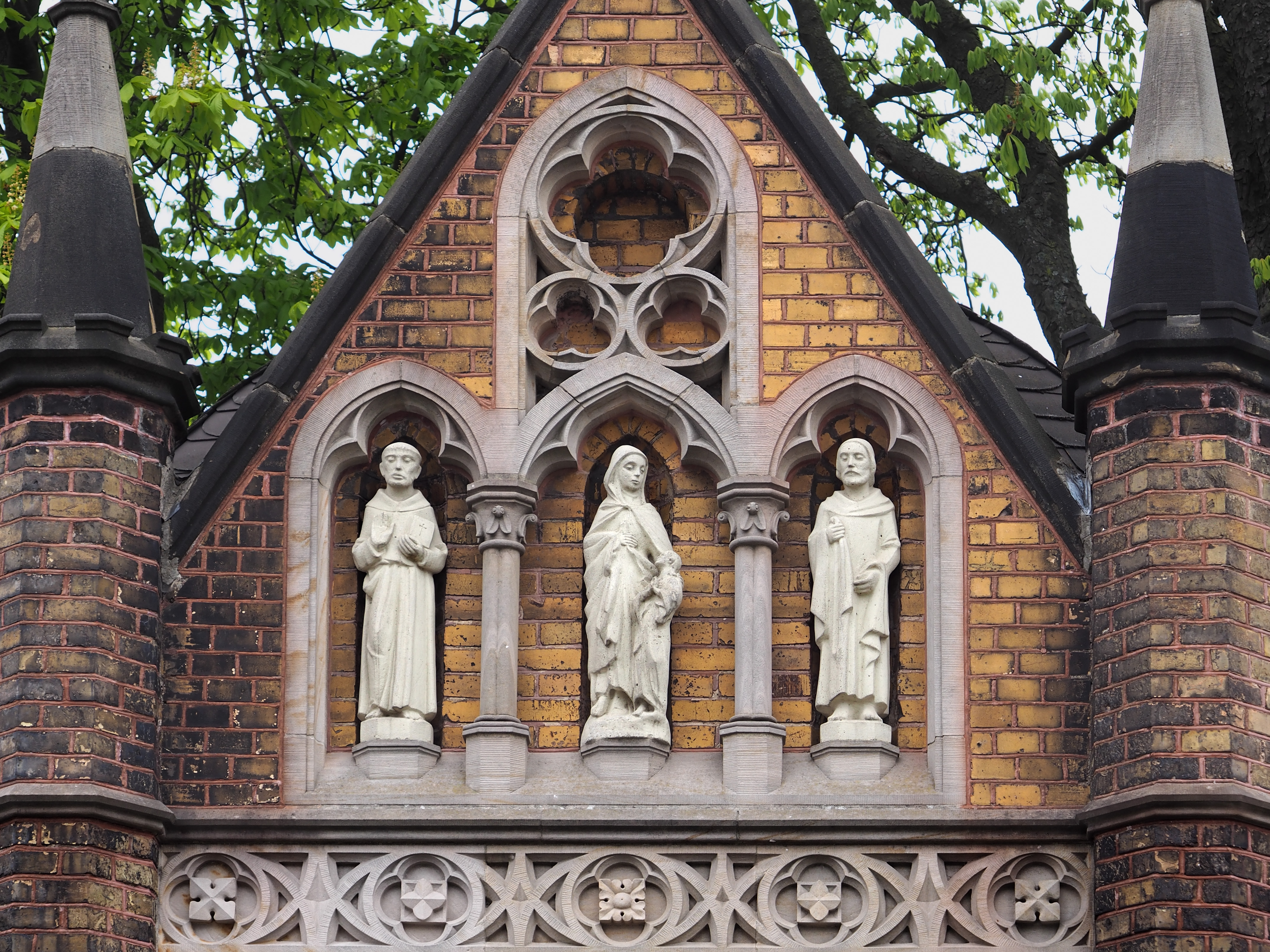 Selm (NRW), Wegekapelle (Kaldeweykapelle) Detail, Foto: April 2017